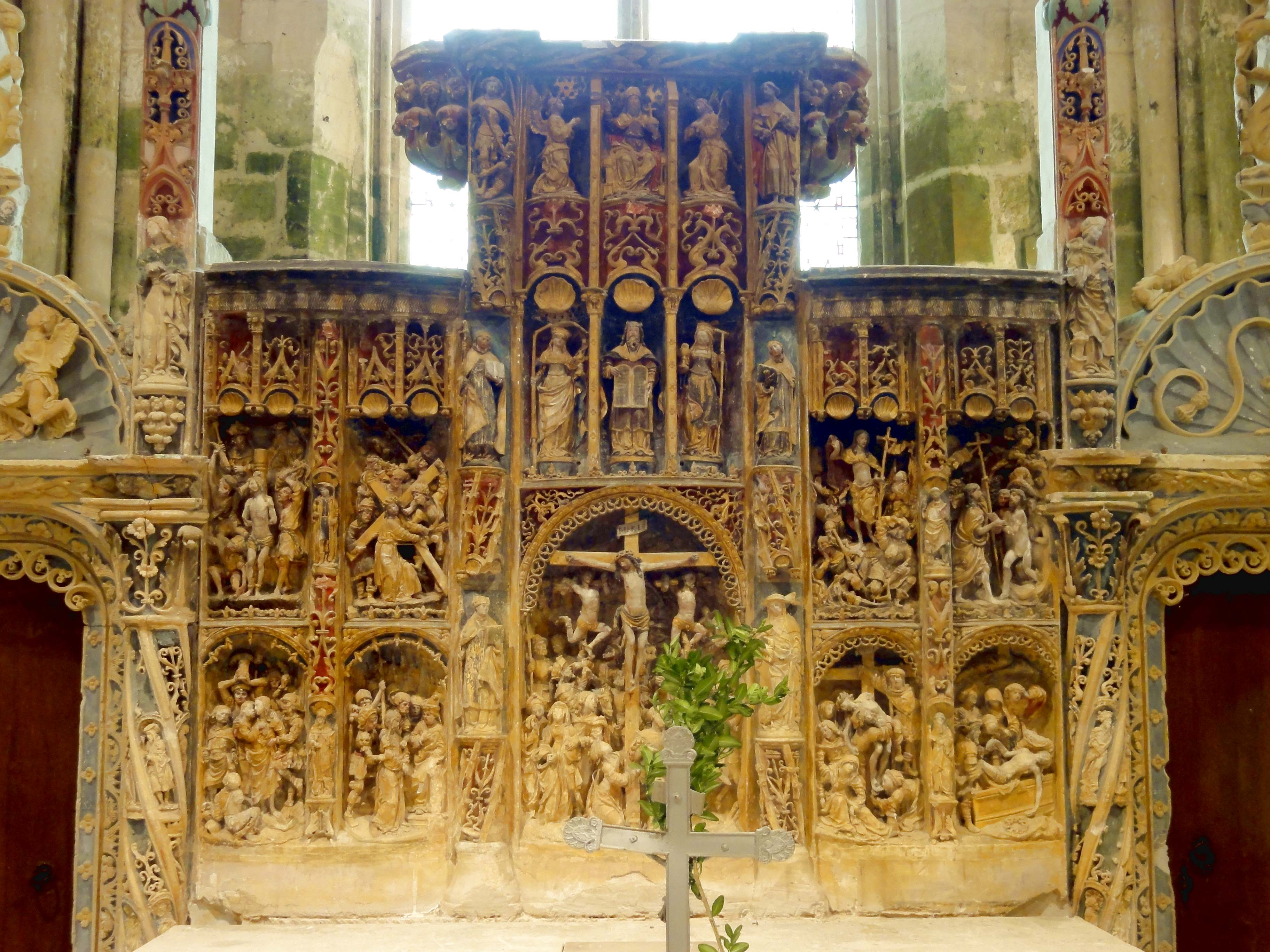 Retable de Nucourt - voir titre.